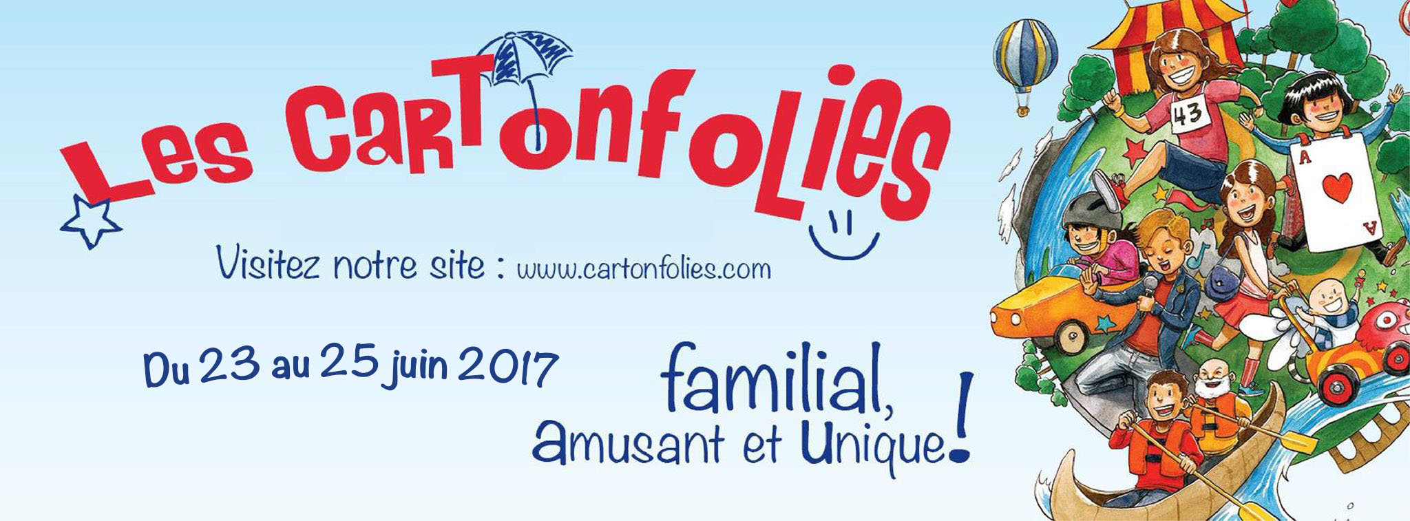 Bandeau 2017